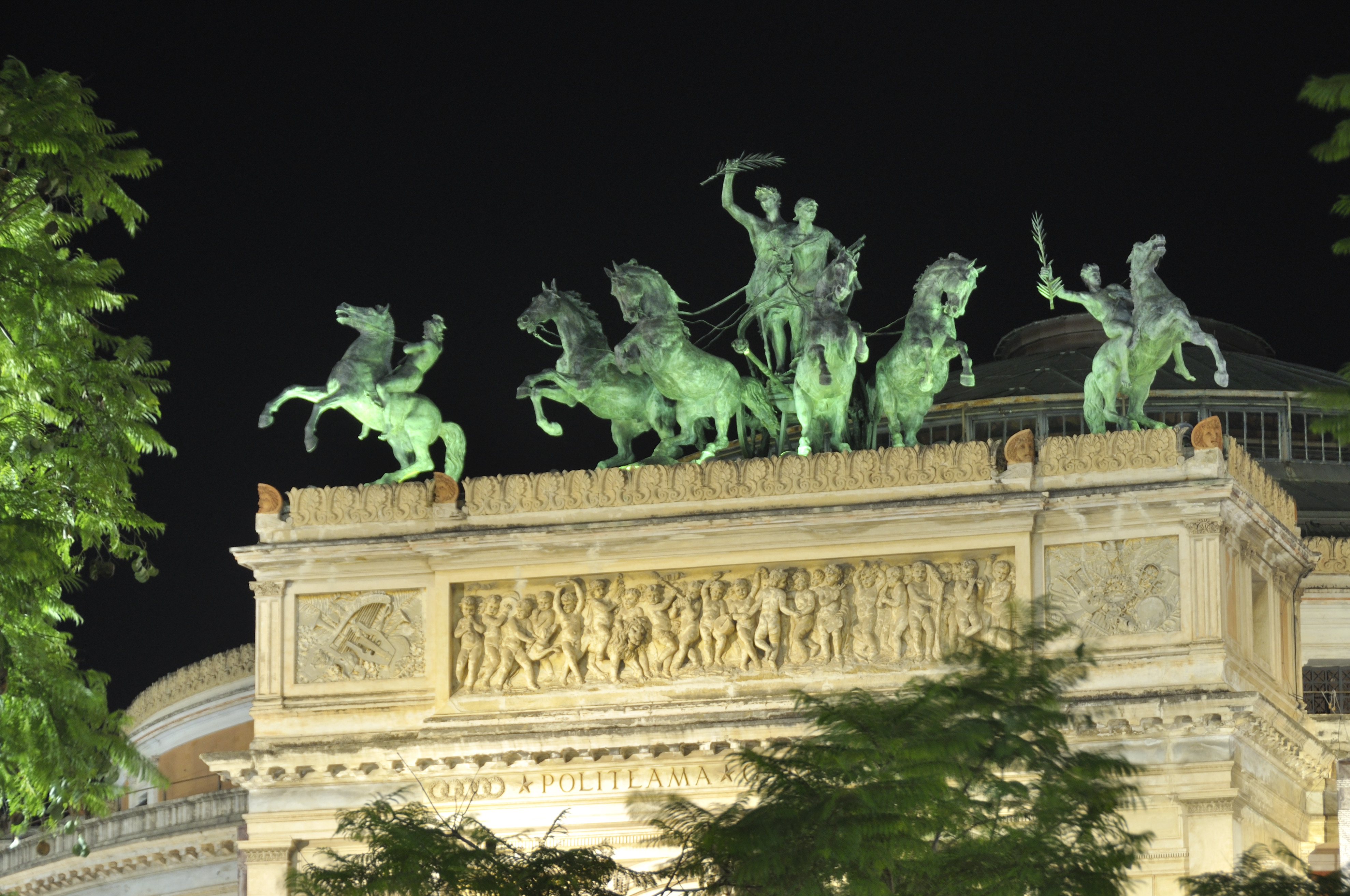 Teatro Politeama in Palermo